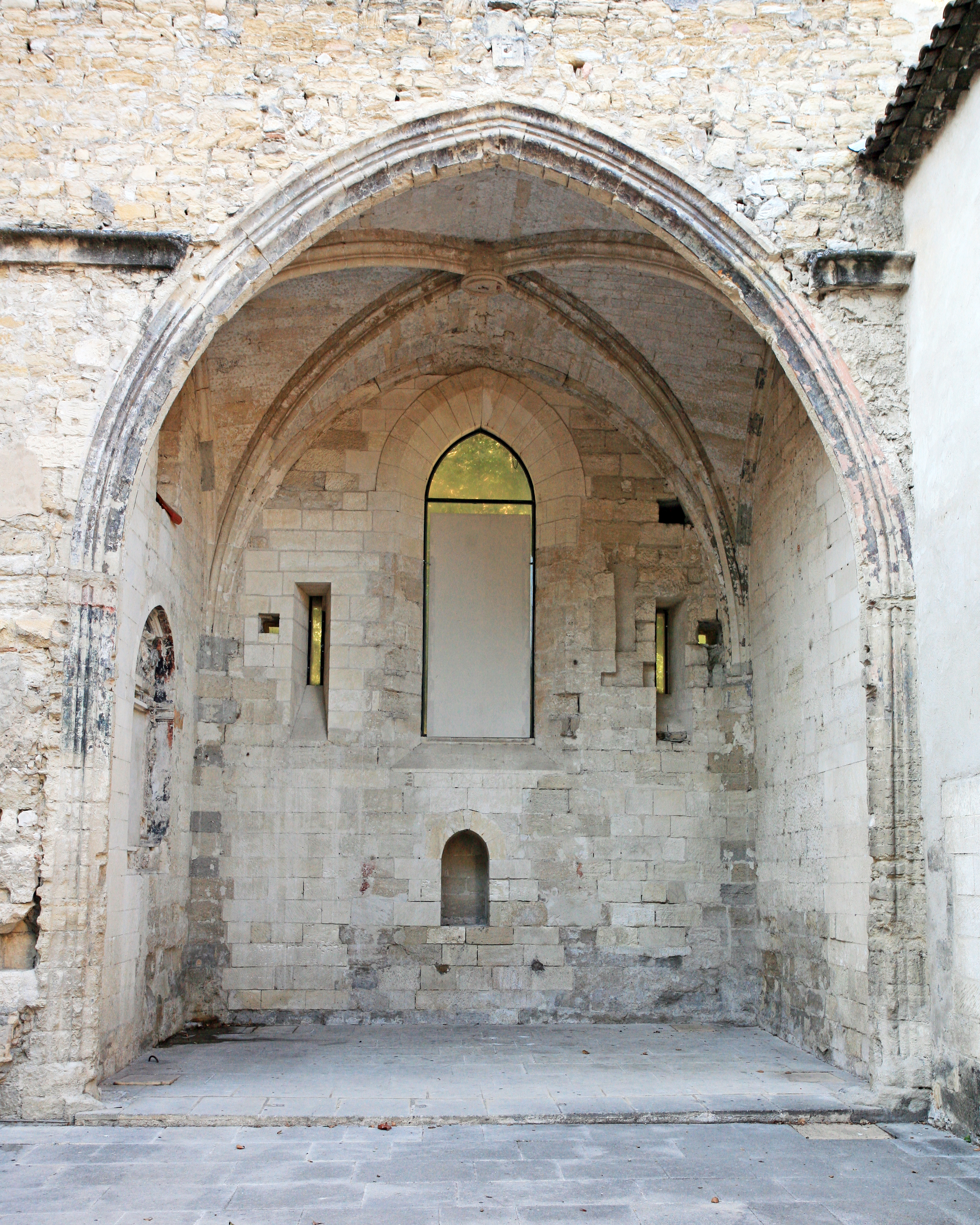 Restes de la chapelle du couvent Sainte-Claire, rue du roi René, Avignon, Vaucluse, France